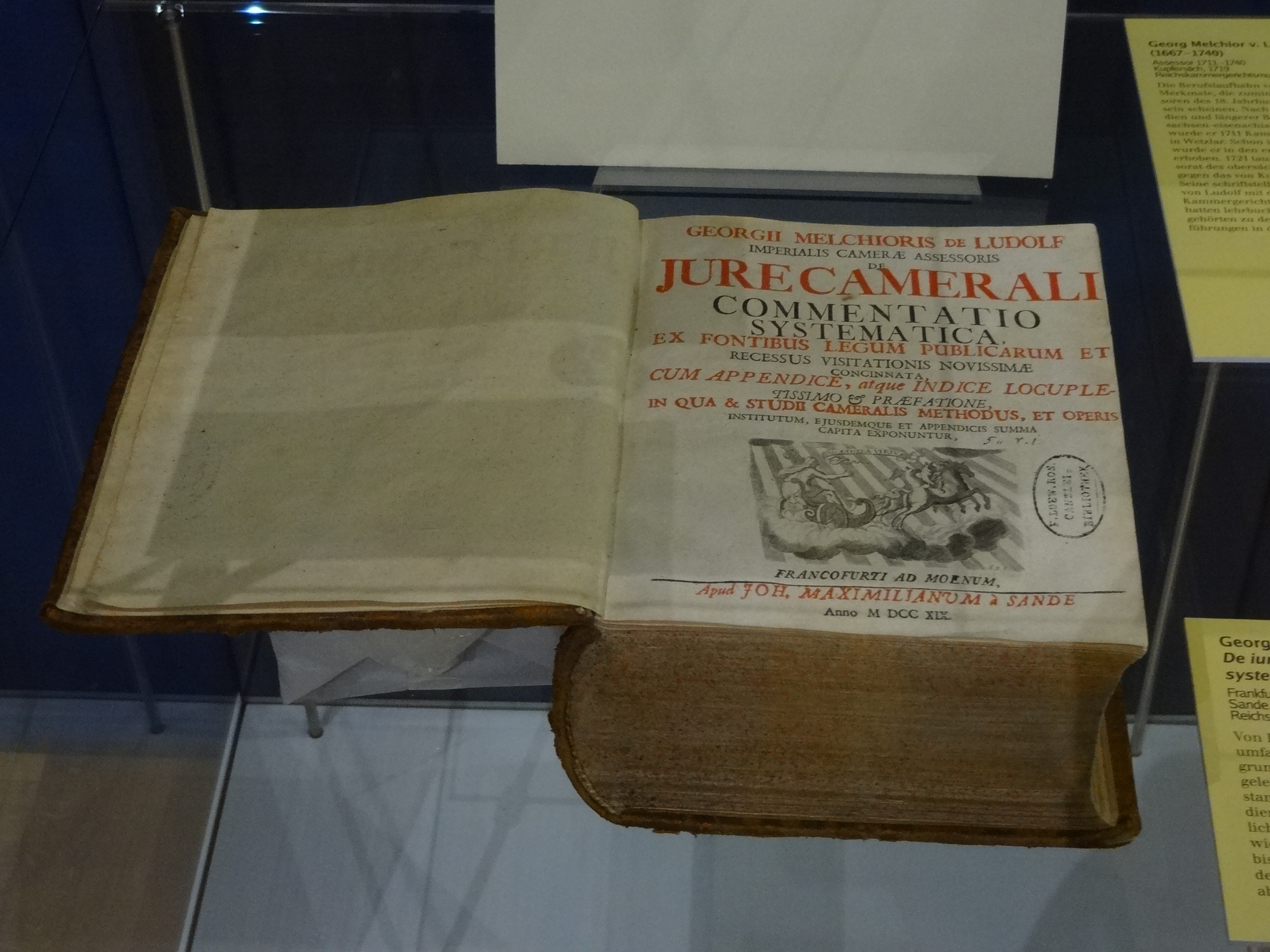 Georg Melchior von Ludolf: De iure camerali commentatio systemica, Frankfurt am Main bei Johann Maximilian von Sande, 1719, Reichskammergerichtsmuseum Wetzlar: "Von Ludolf bearbeitete in dieser umfangreichen Darstellung die Rechtsgrundlagen des Kameralrechts und die gelehrte Fachliteratur zu diesem Gegenstand. Die commentatio systematica diente gleichermaßen der wissenschaftlichen Aufarbeitung des Kameralrechts wie auch der juristischen Praxis. Sie ist bis auf deutschsprachige Textzitate in den Anhängen durchgehend in Latein abgefasst." (Hinweistafel)